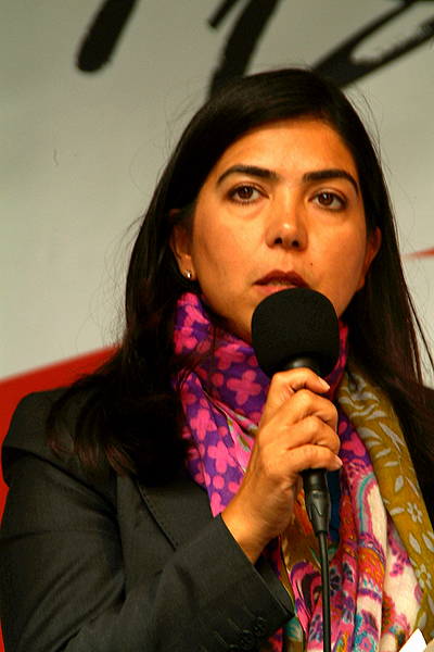 Mit ernstem Gesichtsausdruck spricht Niedersachsens Sozialministerin Aygül Özkan (CDU), Schirmherrin der Solidaritätstafel 2012, über die Situation unserer Kinder und Jugendlichen; hier äußerte sich Frau Özkan zu Ganztagsschulen, Kinderbetreuung und alleinerziehende Mütter ...